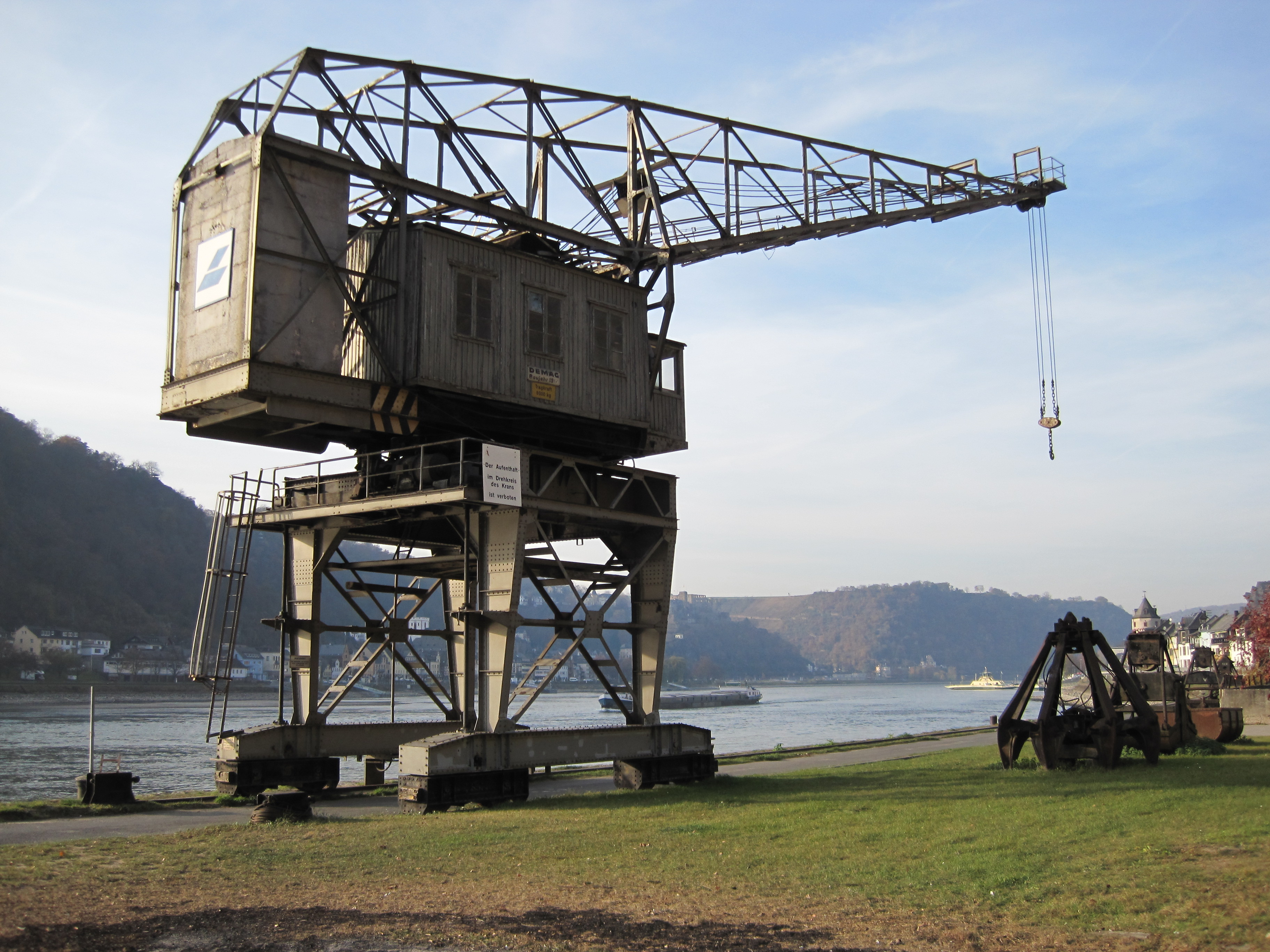 Der 1917 von der Maschinenfabrik Jäger aus Duisburg (später DEMAG) erbaute Häuser Kran ist ein Portaldrehkran in St. Goarshausen am Rhein.